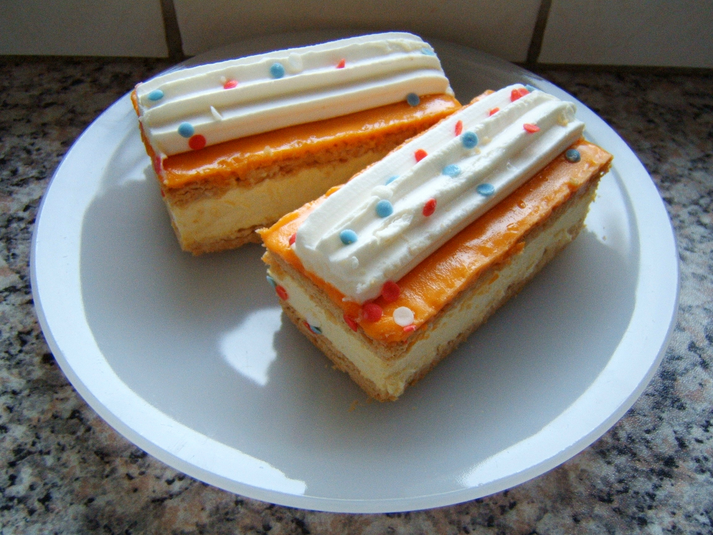 Feesttompoucen